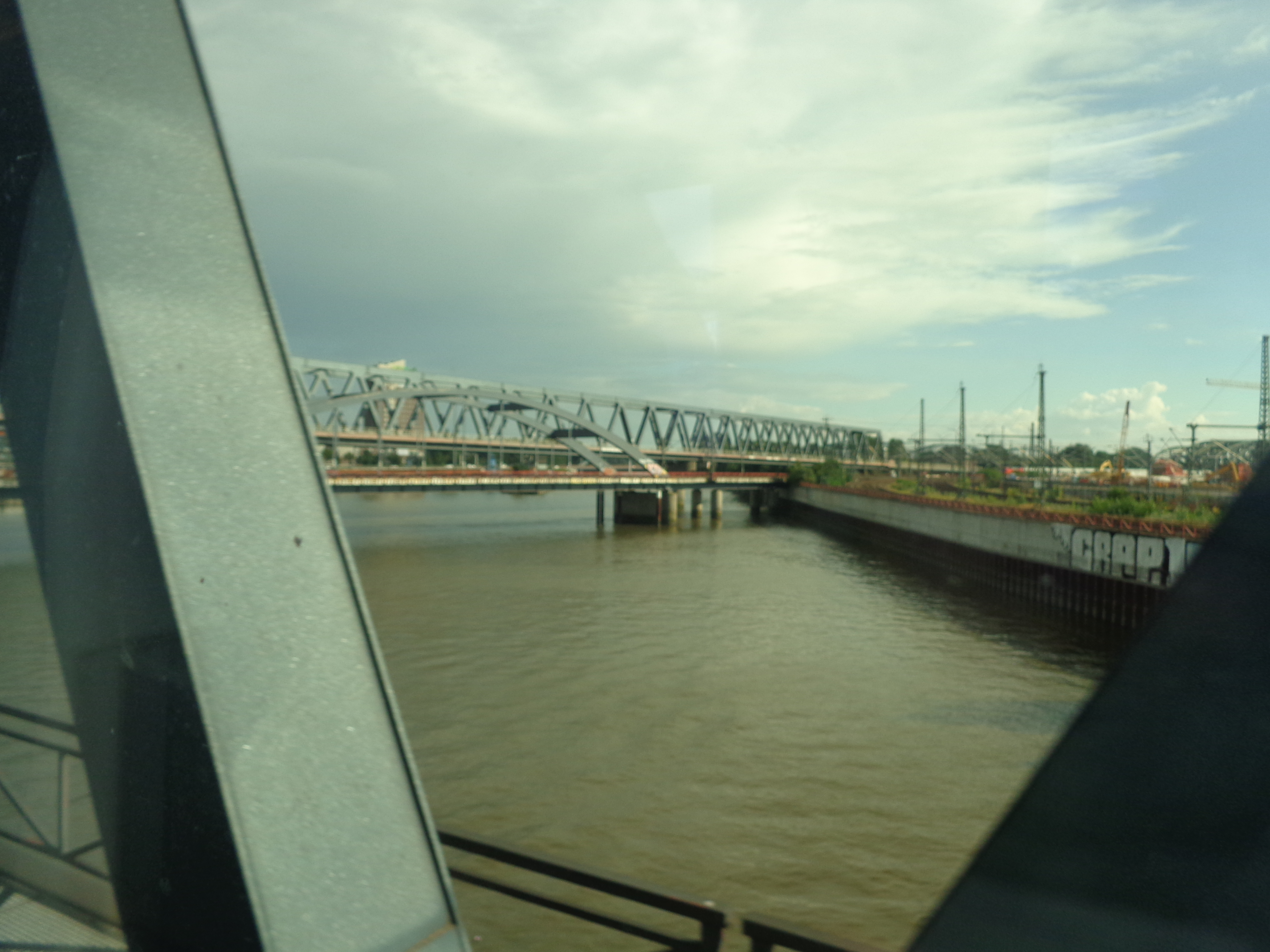 Gleisdreieck am Ostende des Hamburger Oberhafens